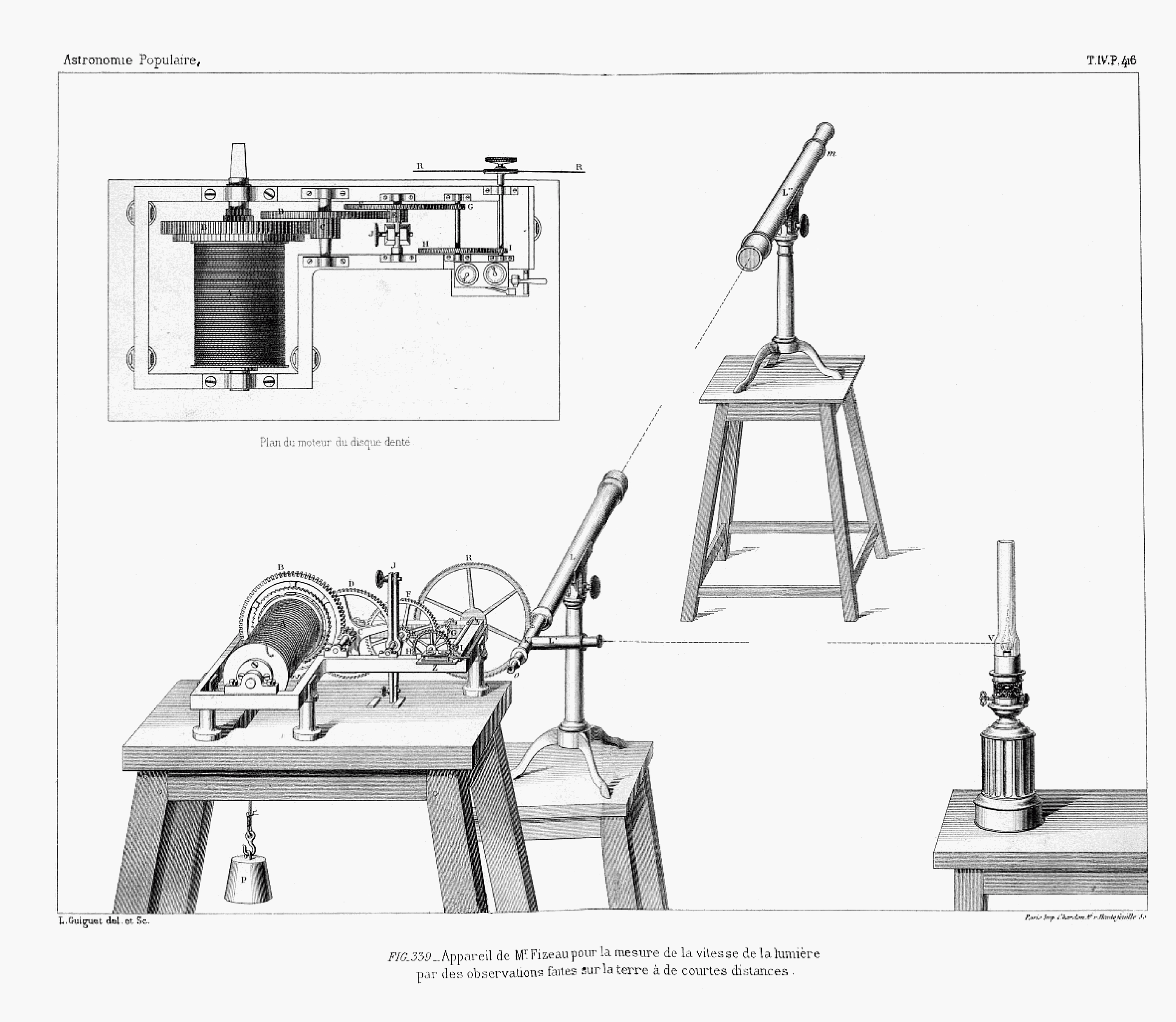 Fig. 339. — Appareil de M. Fizeau pour la mesure de la vitesse de la lumière par des observations faites sur la Terre à de courtes distances.